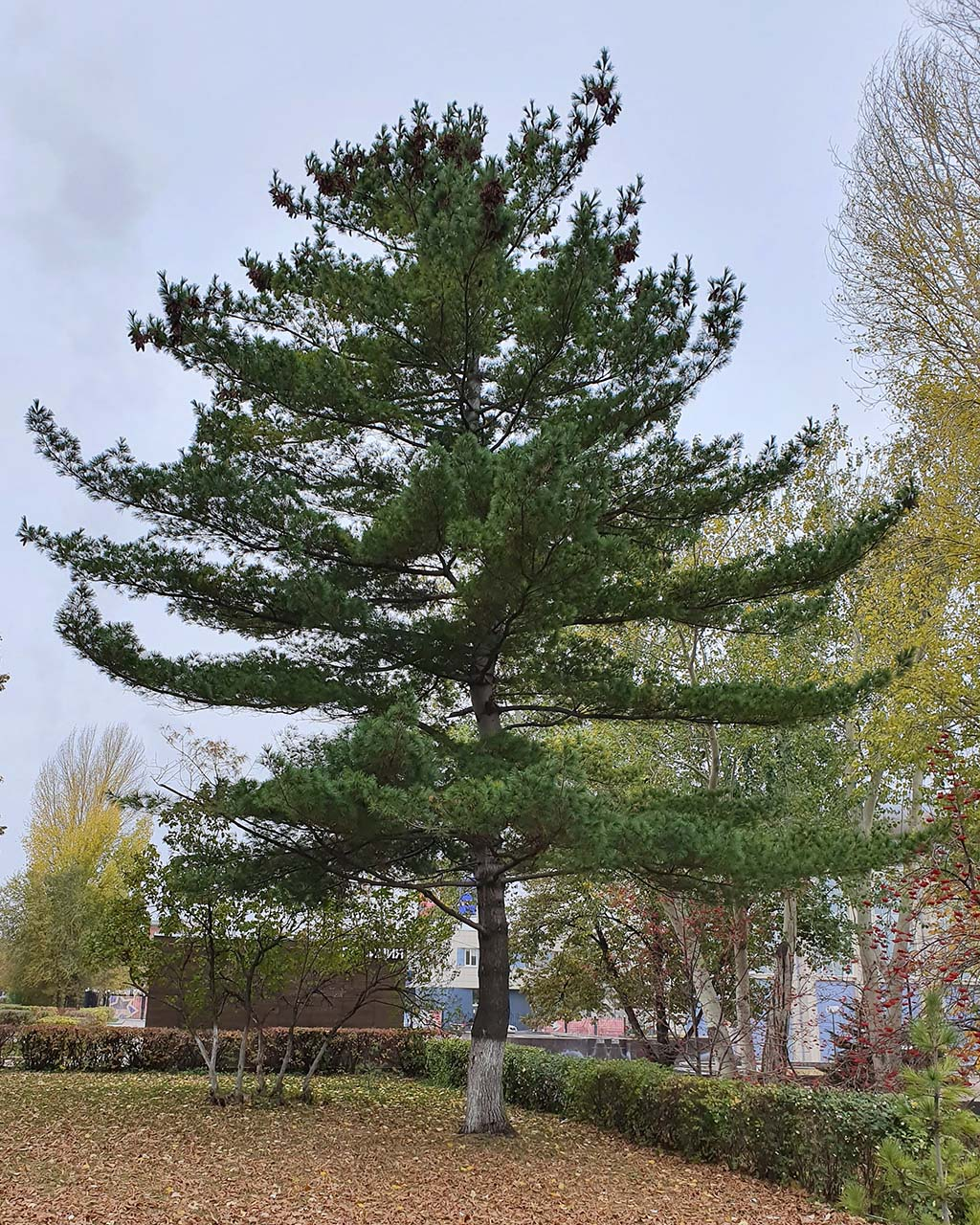 Веймутова сосна на набережной города Самары. Общий вид..